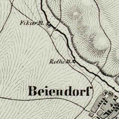 Gegend nordöstlich von Beyendorf mit Vikarienmühle und Rother Mühle an der Sülze, Karte nicht eingnordet, oben ist Osten, links ist Norden